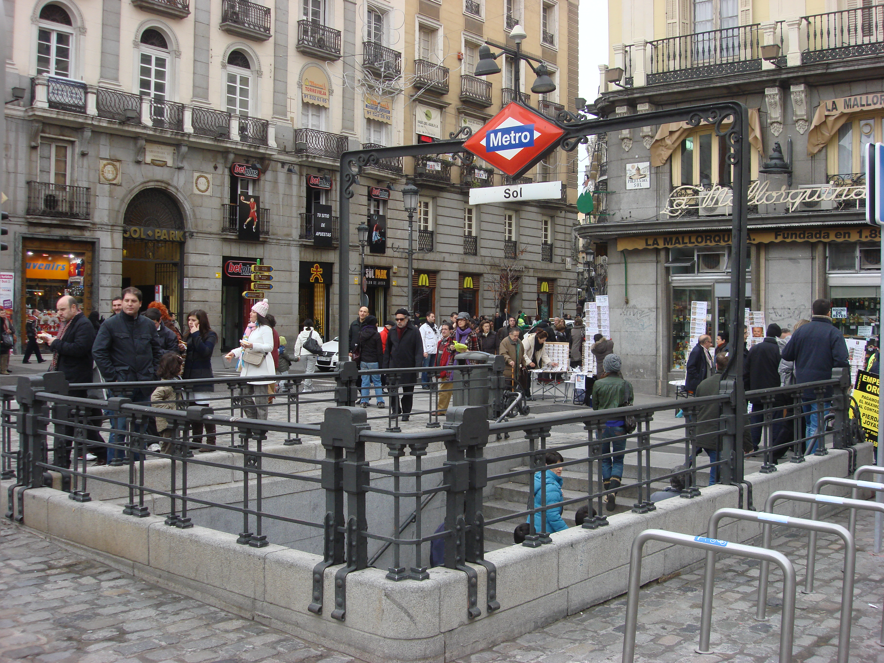 Own work